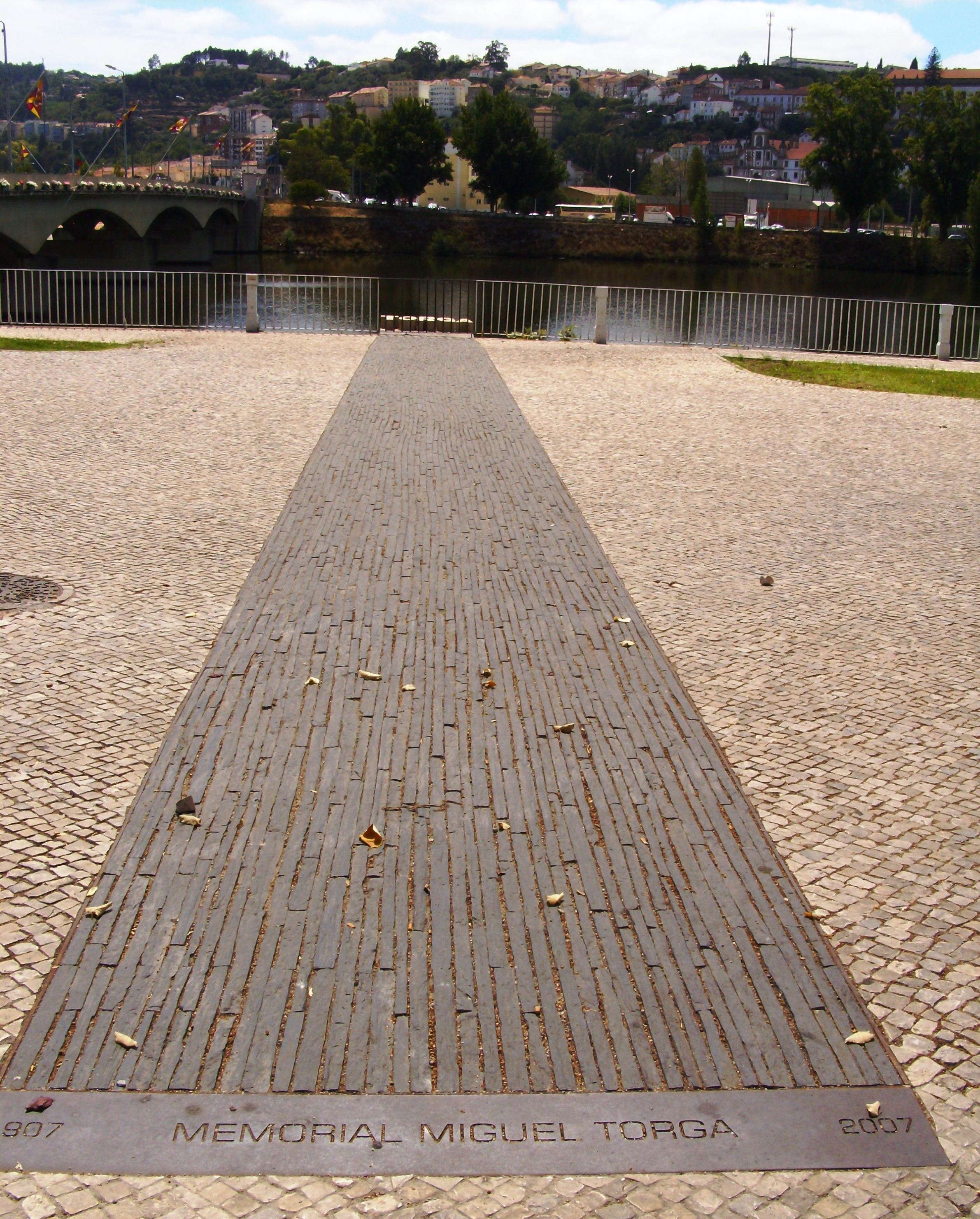 Memorial Miguel Torga (1907-2007), vizinho à ponte de Santa Clara, Coimbra, Portugal.